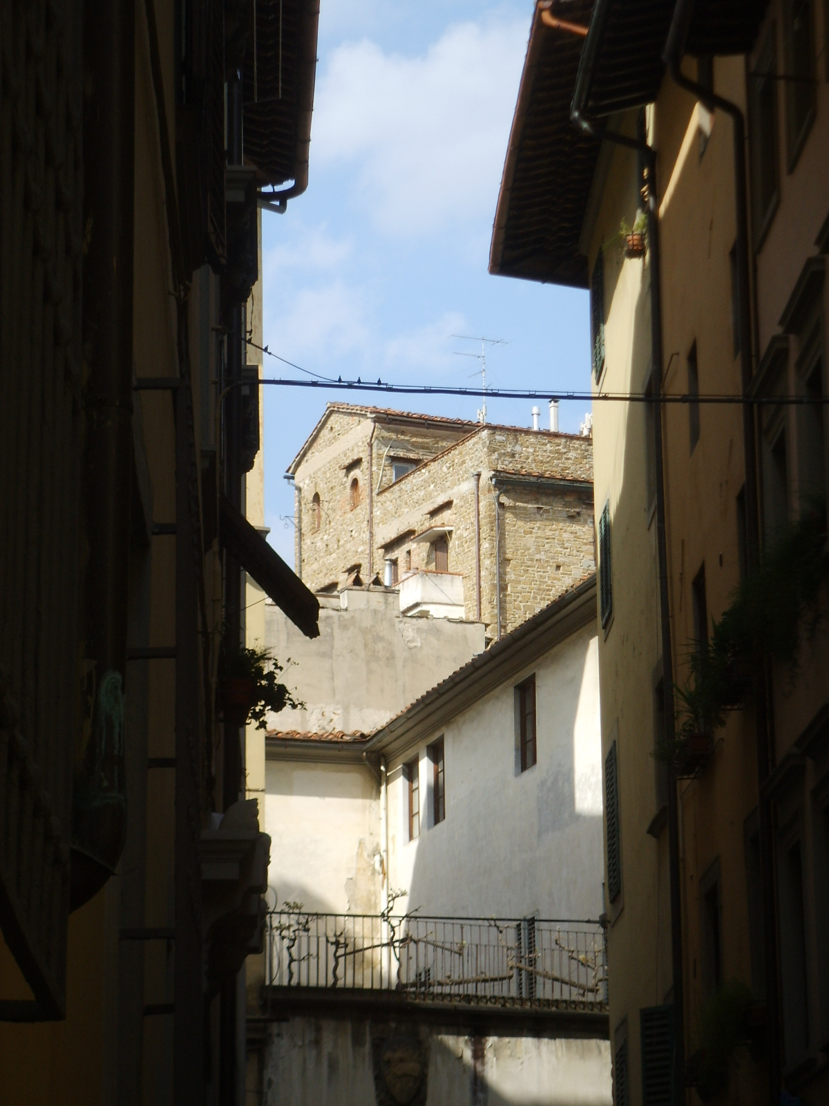 Torre di corso donati, view